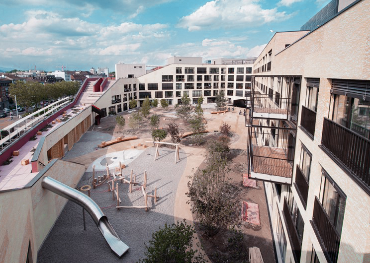 Photo de la coopérative d'habitat kalkbreite